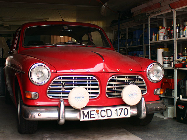 Mein Volvo Amazon 122S Bj. 1969.